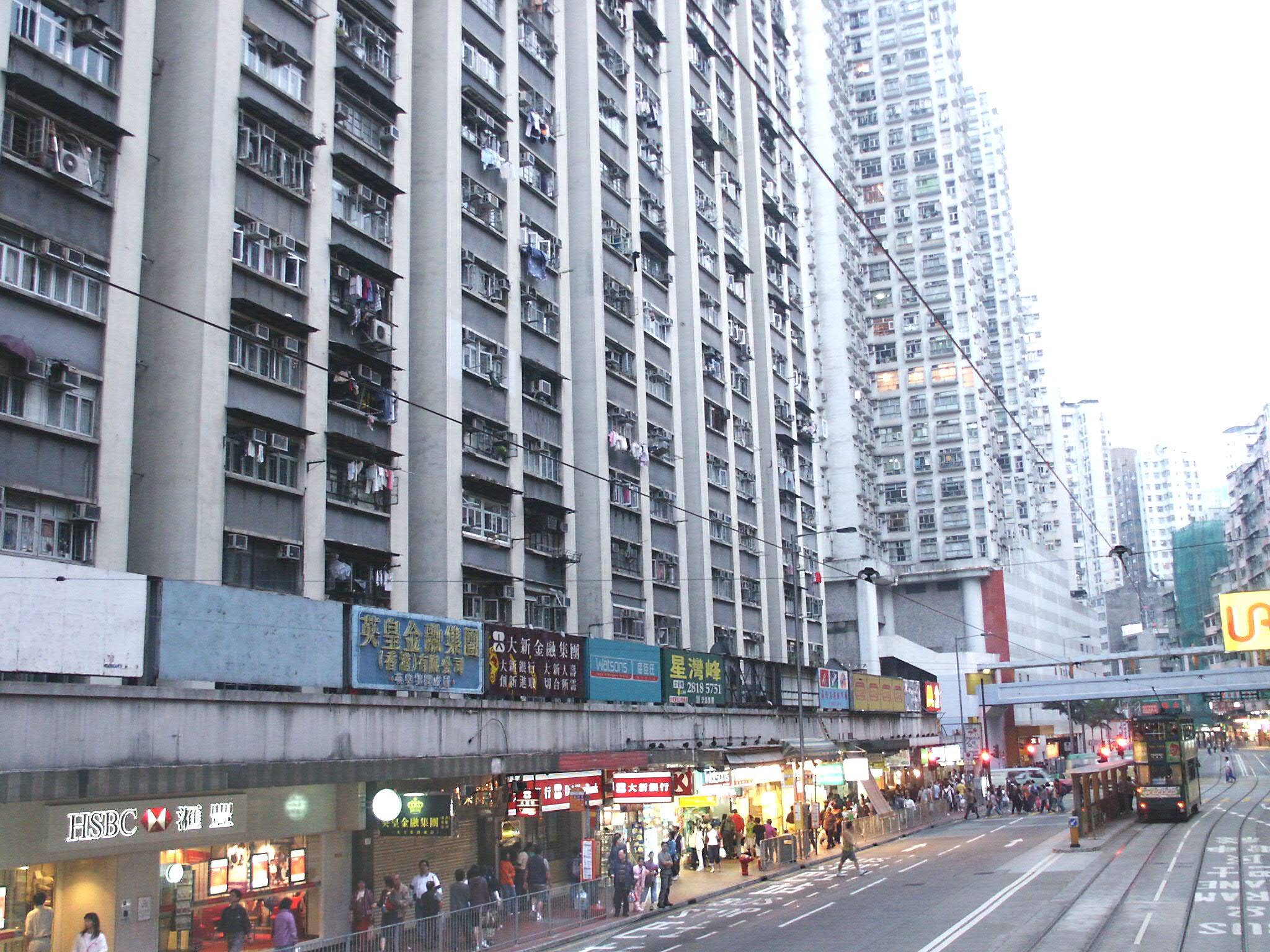 筲箕灣道太安樓